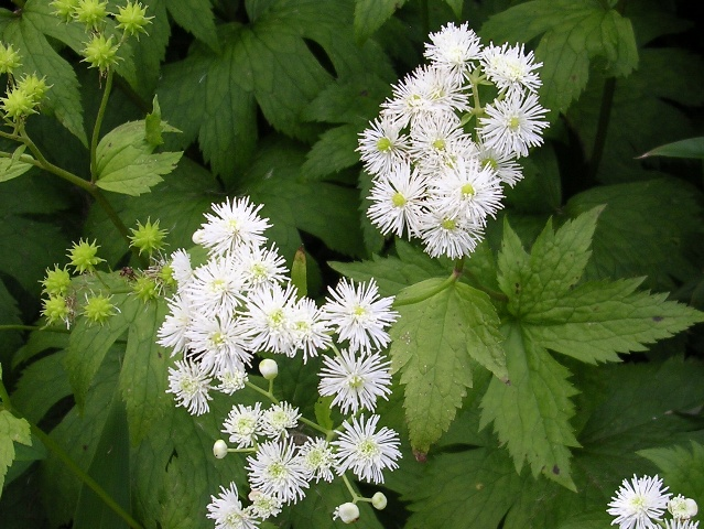 モミジカラマツ (岩手県八幡平)Trautvetteria caroliniensis var. japonica (Mt.Hachimantai, Iwate, Japan)